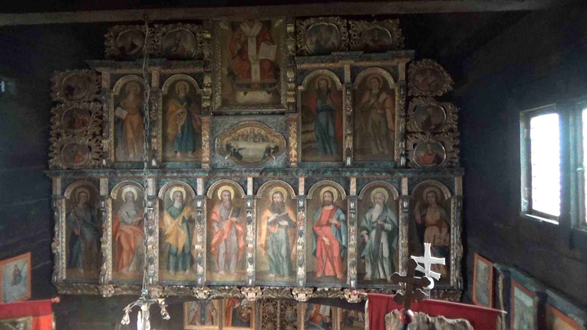 Ikonostas v kostele Všech svatých v Dobříkově